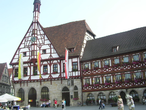 Rathaus Forchheim Quelle: fotografiert am 15. August 2004 Fotograf: Richard Schubert Lizenzstatus: GNU FDL Kategorie:Bild:Rathaus